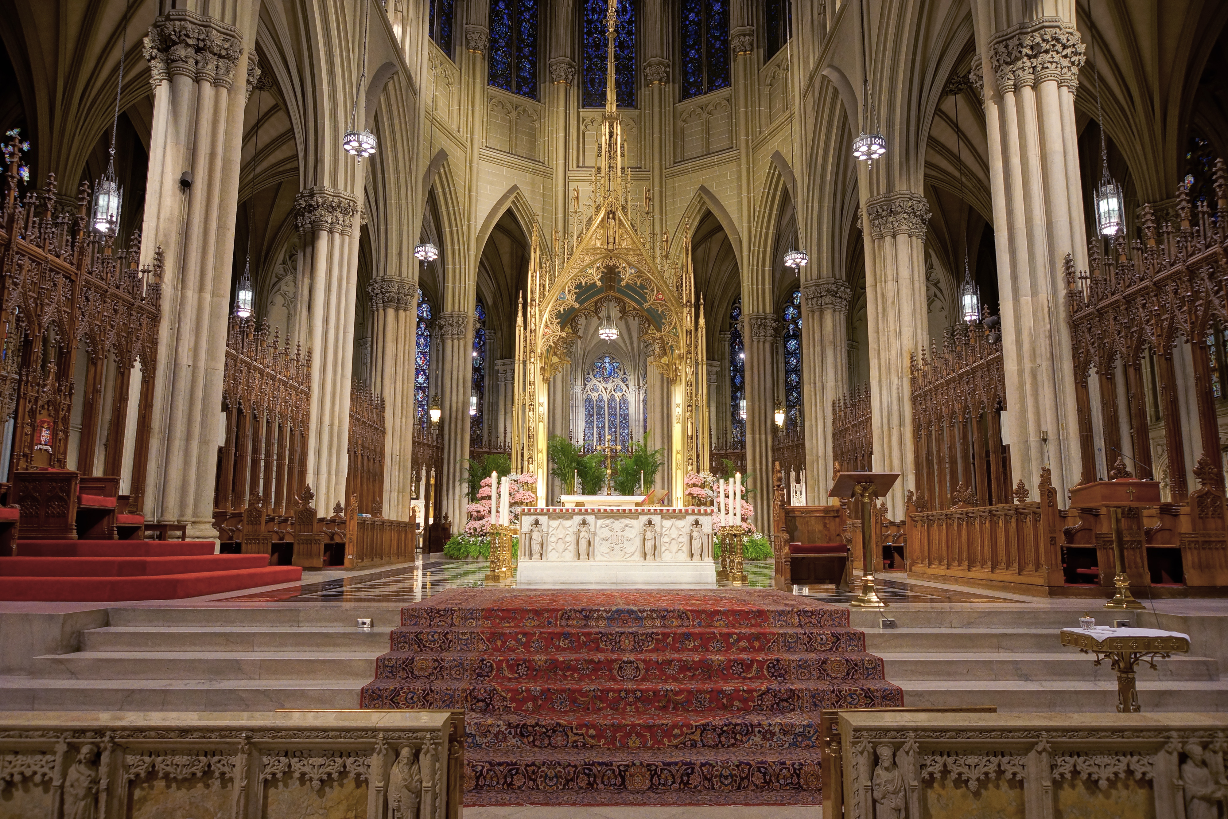 NYC - St. Patrick's Cathedral - Choeur